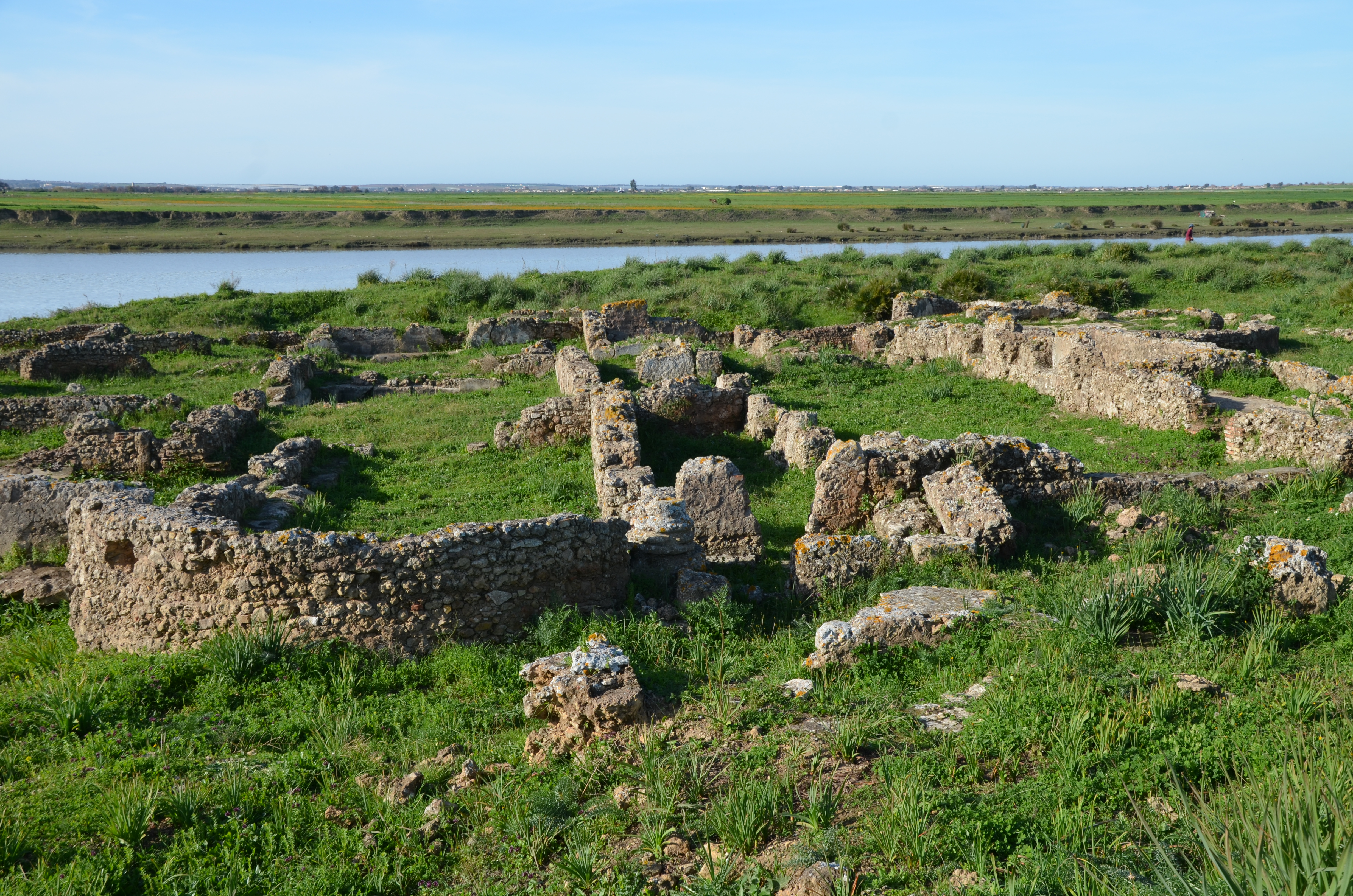 Thamusida, Mauretania Tingitana, Morocco